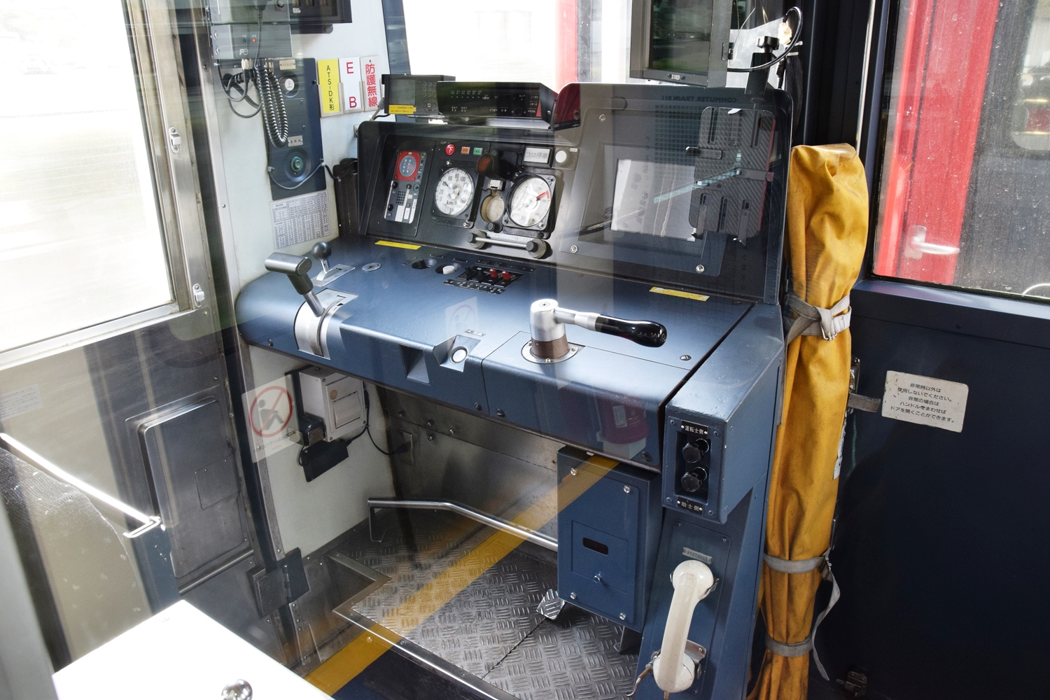 リニューアル車の運転席